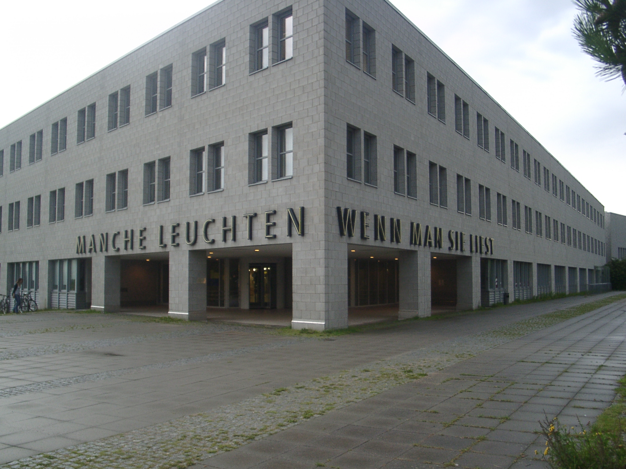 Universitätsbibliothek Kiel, Neubau